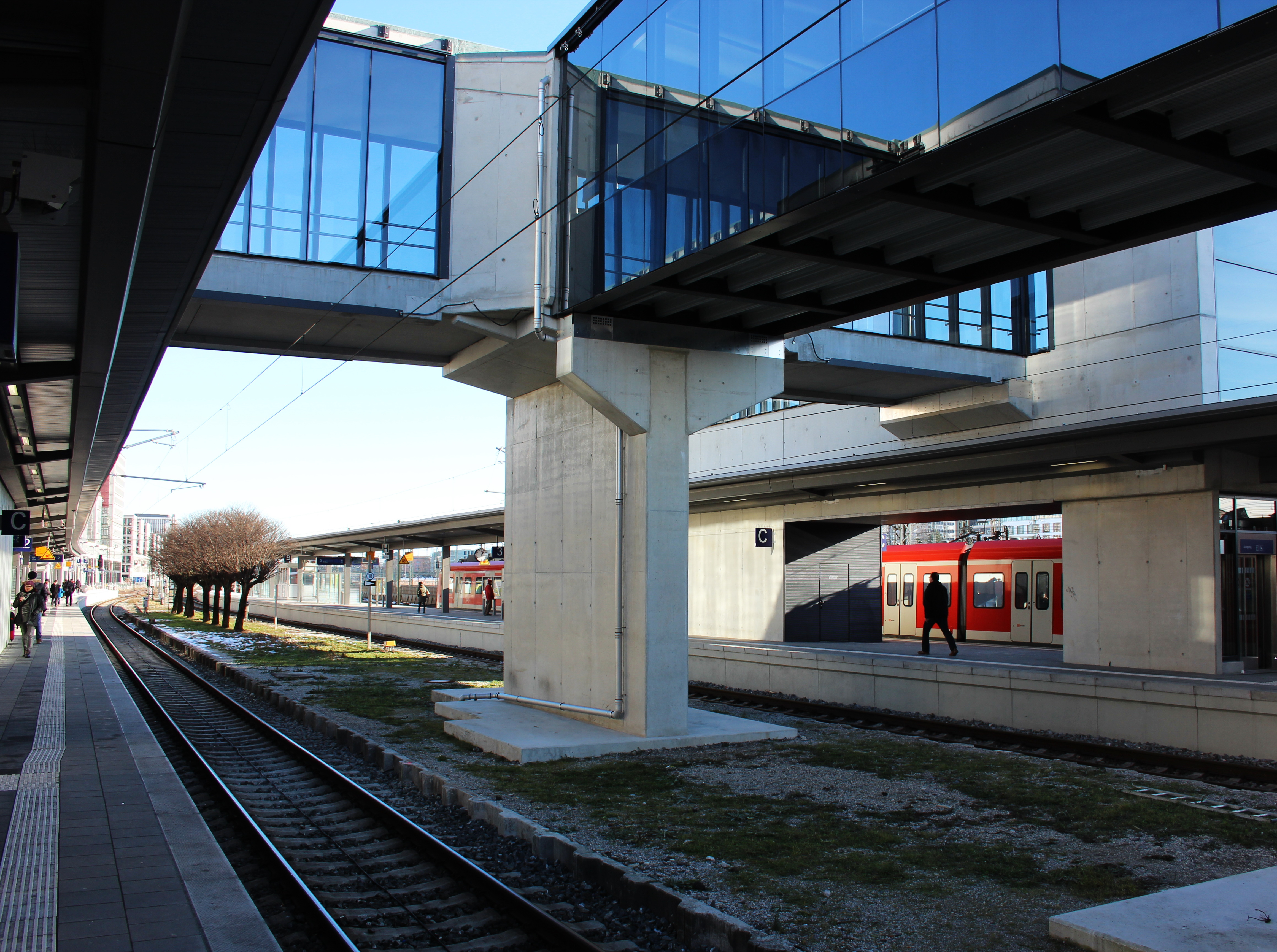 S-Bahn-Hof Donnersbergerbrücke in München